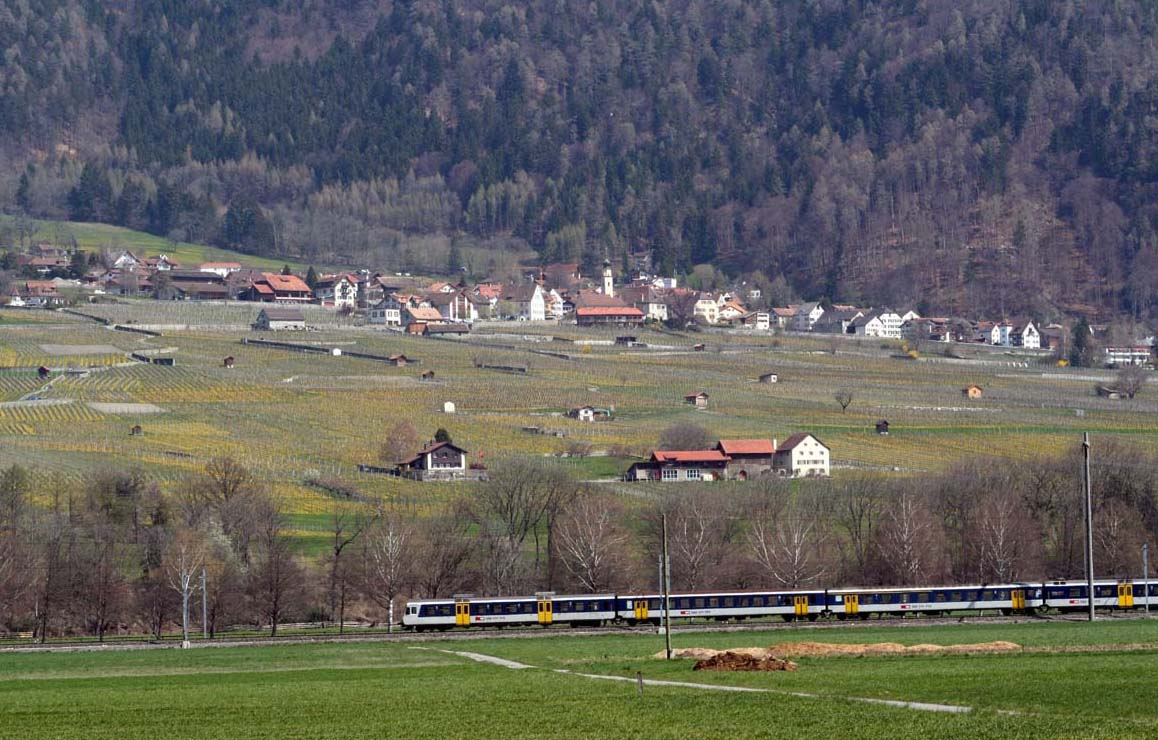 Jenins